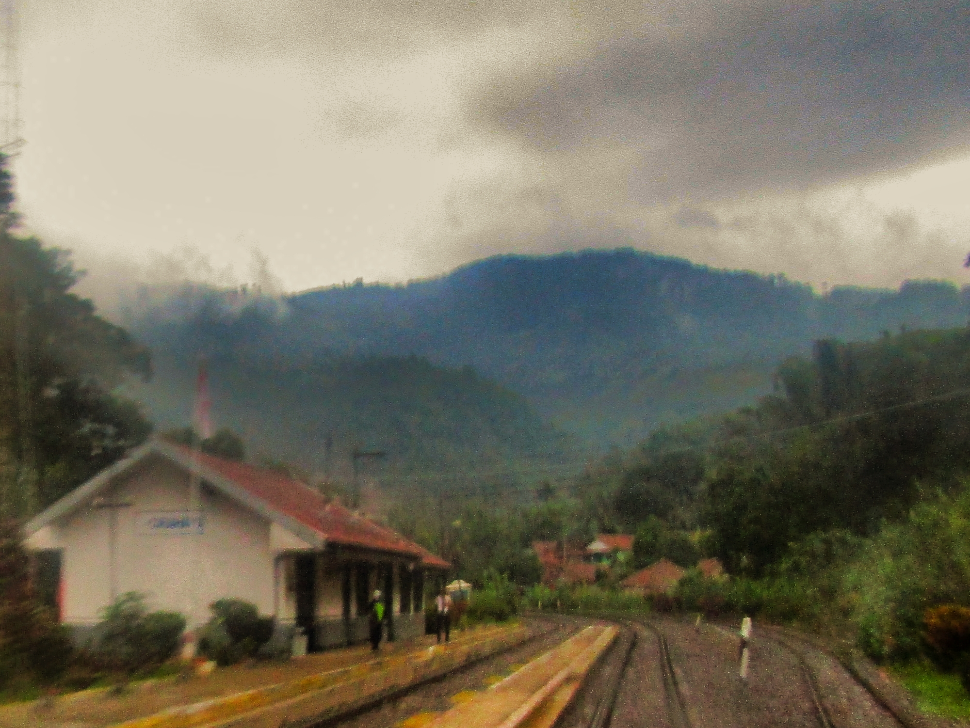 Bangunan Stasiun Cirahayu 2020